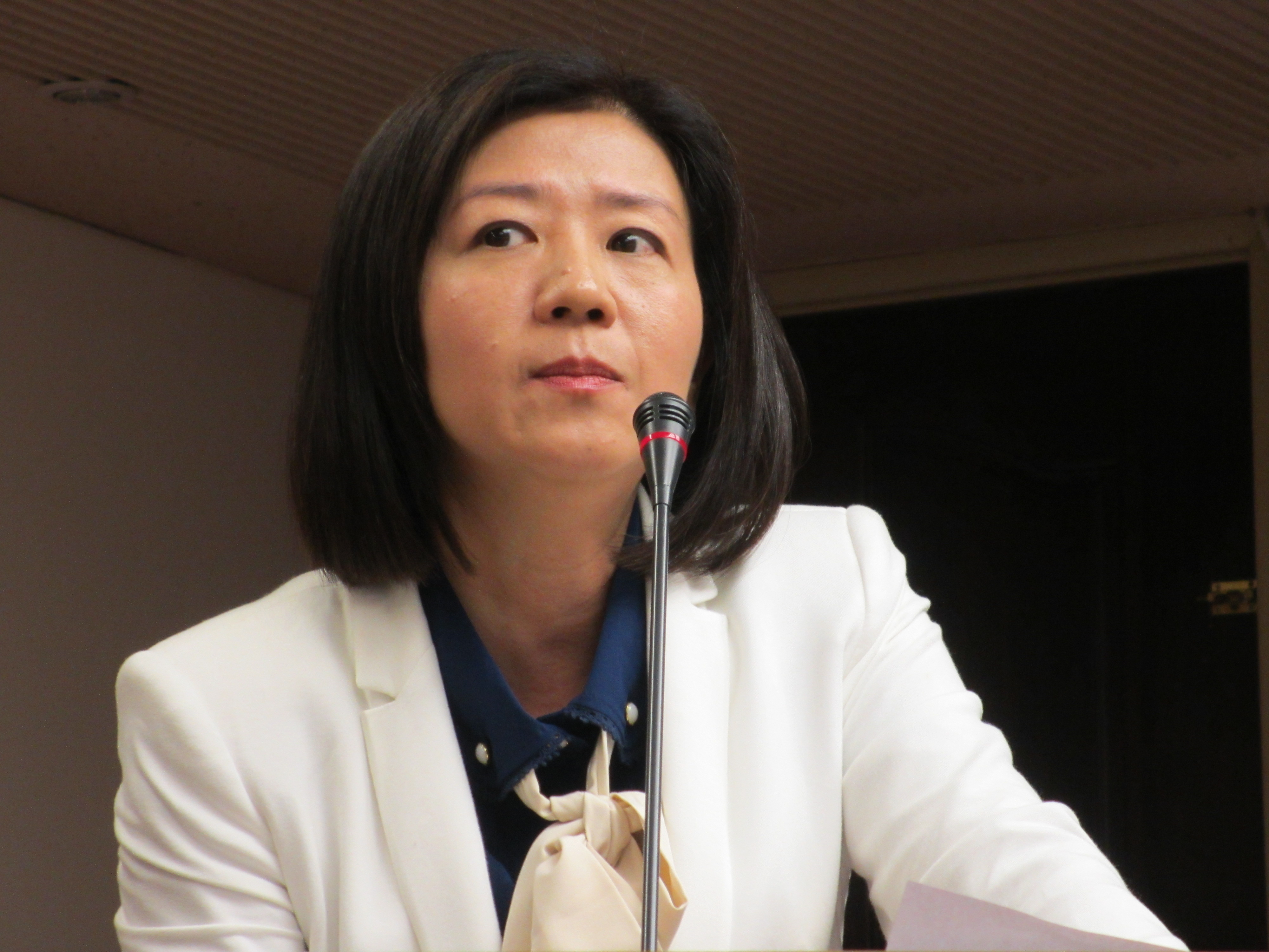 王育敏(美国之音张永泰拍摄)